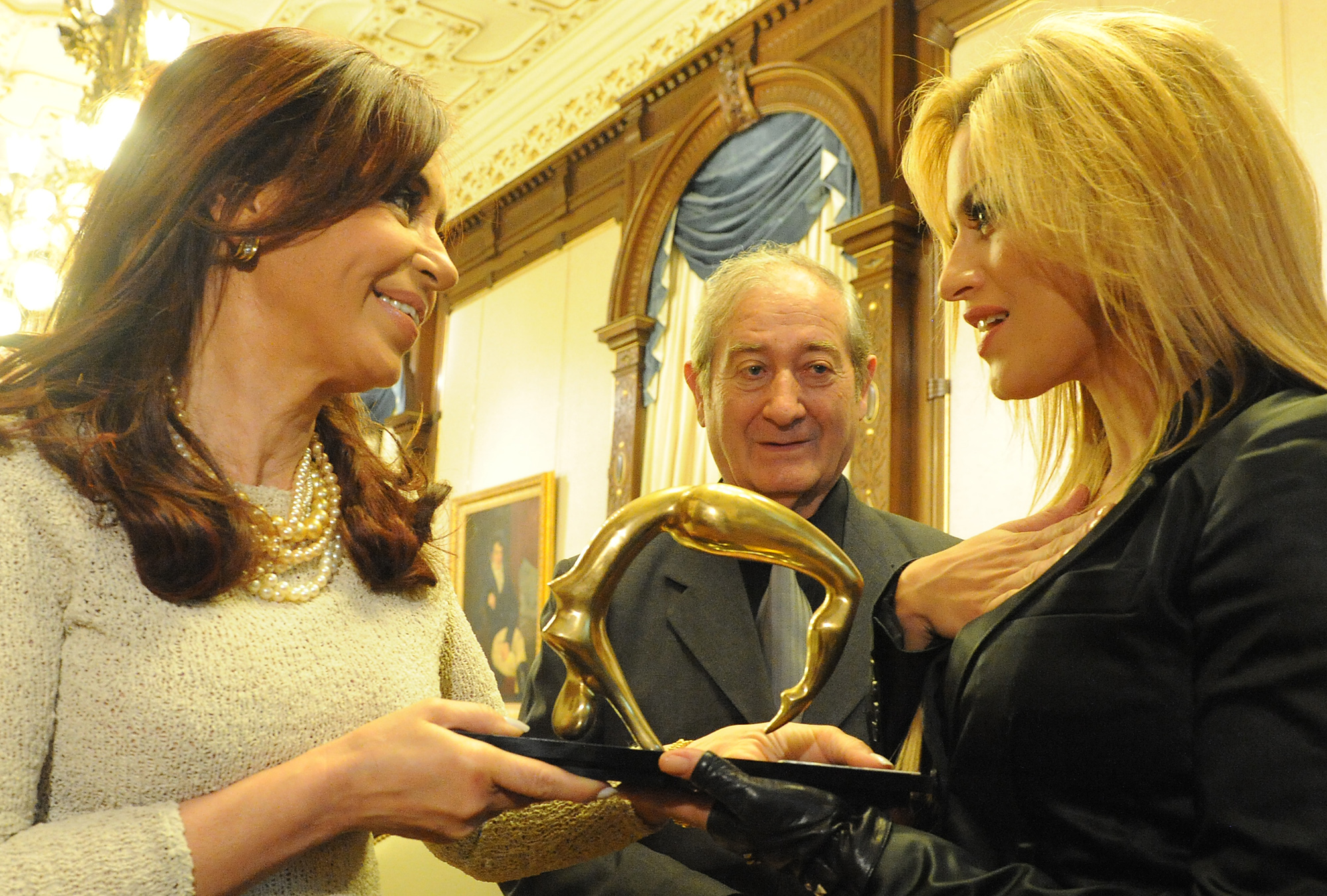 Lola Ponce con la Presidente de Argentina Cristina Fernandez de Kirchner